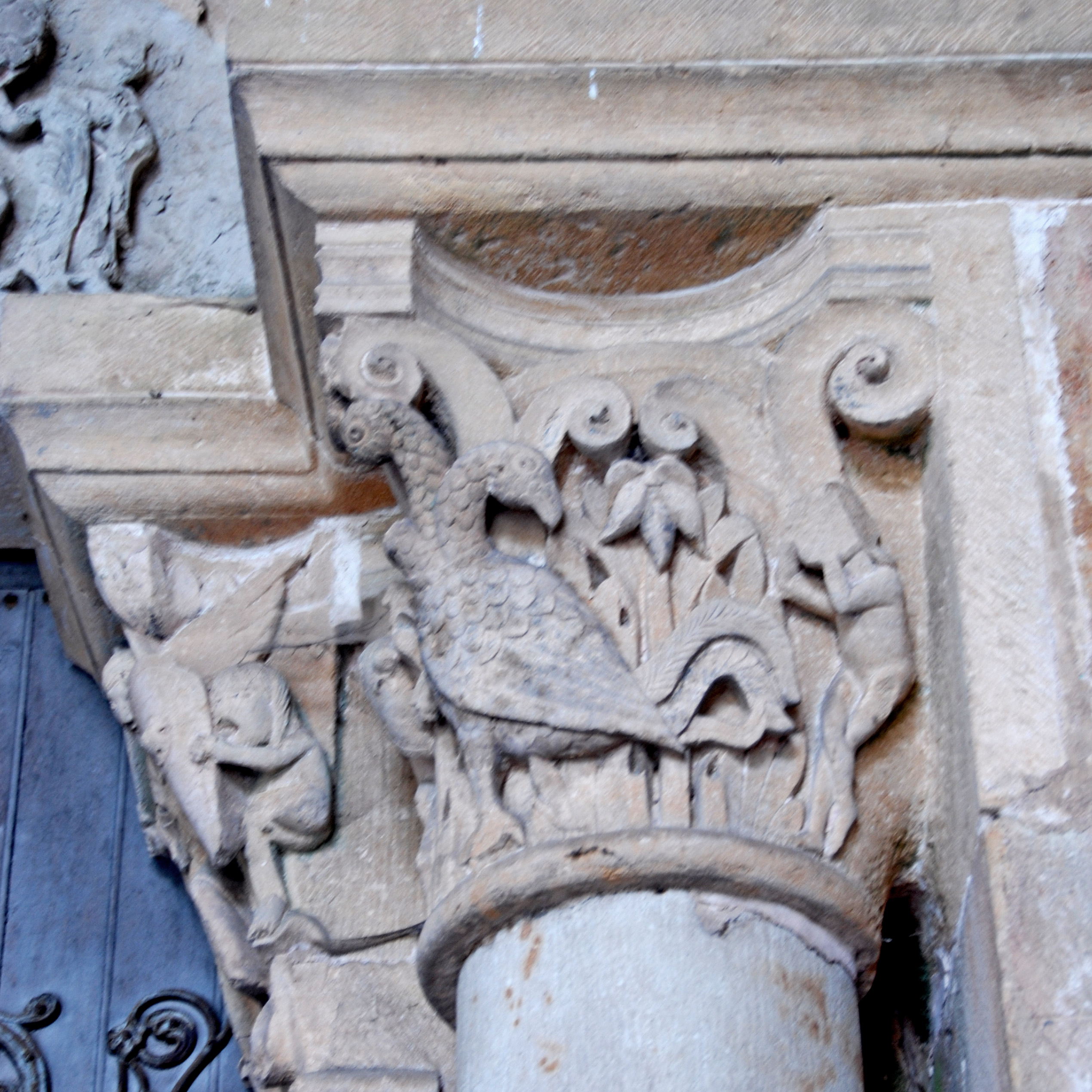 Portalkapitelle rechts